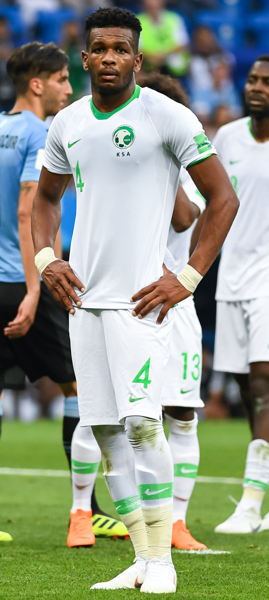 Али аль-Булеахи